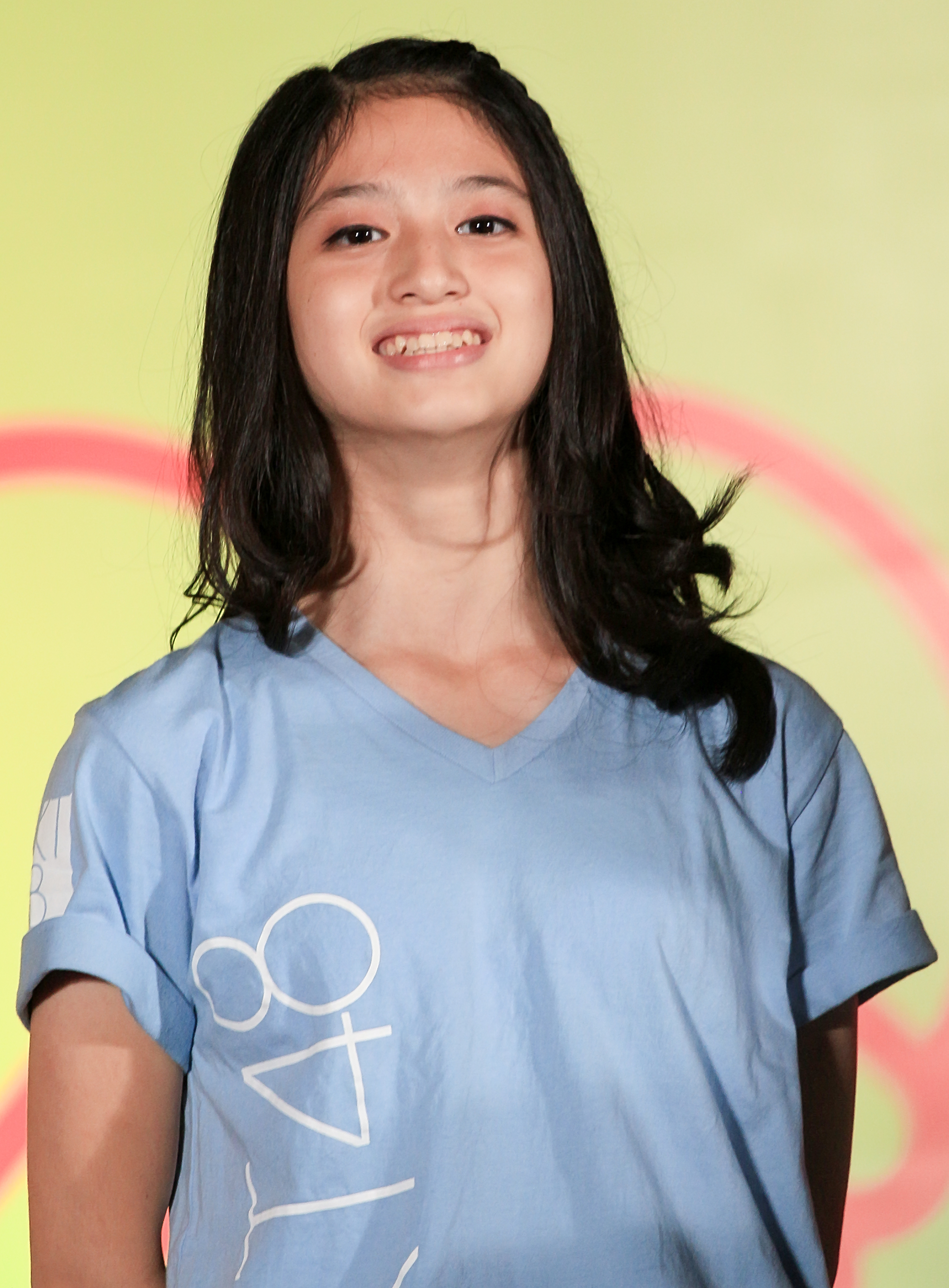 Eve Antoinette Ichwan di JKT48 Mae Shika Mukanee Handshake Festival.